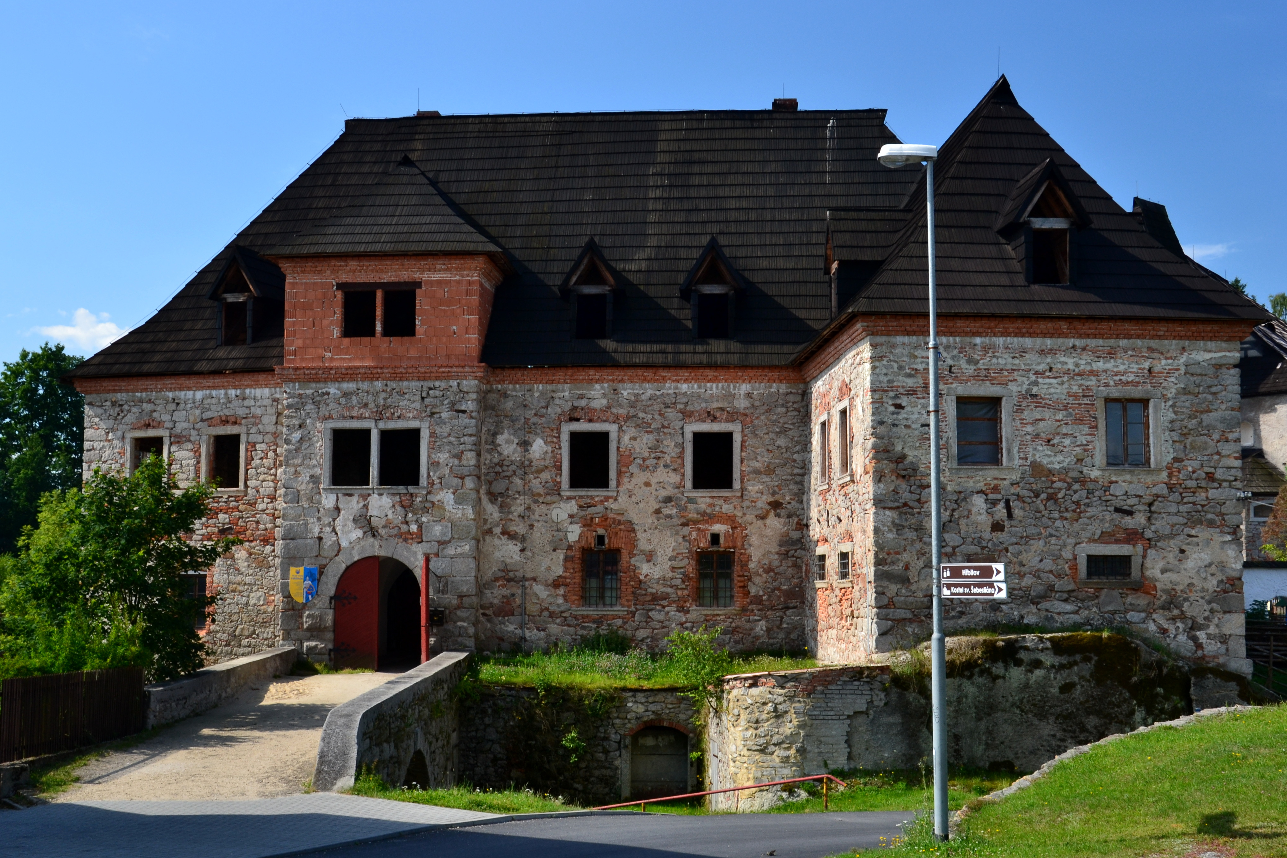 Hrad Vildštejn (Wildstein), Skalná, zřícenina (Skalná), Skalná 81